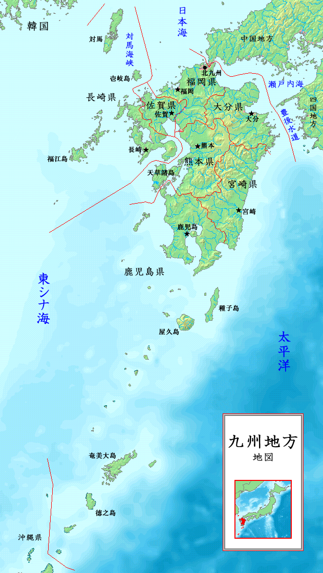 九州地方の地図である。